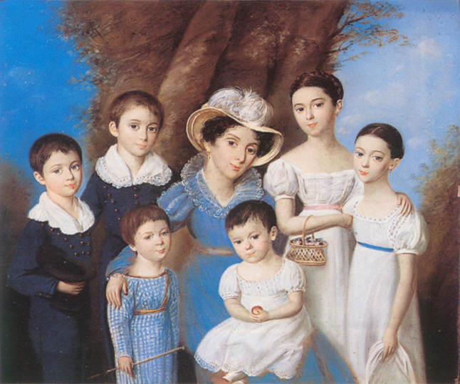 Портрет Екатерины Ивановны Новосильцевой с детьми. 1830 (?) Е.И. Новосильцева (?—1864) — рожденная графиня Апраксина, жена Николая Петровича Новосильцева. Род ее мужа не был древним, его основоположник, Петр Новосильцев, из орловских мещан, начал службу канцеляристом, дослужился до должности петербургского вице-губернатора и получил потомственное дворянство. Сошлемся еще раз на Вигеля: „Нельзя было не полюбить г. Новосильцева за его редкий ум и необыкновенные дарования: они кривому подьячему открыли путь до степени государственного человека и дали его семейству притя же некоторое право на знатность". Его сын, Николай стал сенатором и товарищем министра внутренних дел и смог жениться на графине Апраксиной. У них были дети: Ардалион, впоследствии полковник (?—1878), Василий, Петр (?); Иван (?), Мария, фрейлина (?—1865) и Екатерина, с 1838 года ставшая женой гофмаршала Эммануила Дмитриевича Нарышкина. Изображенные: Екатерина Ивановна Новосильцева, ур. графиня Апраксина (179.—1864), жена Николая Петровича Новосильцева (1789-1856), с детьми: Ардалион, впоследствии полковник (1816—1878), Василий (1818-1870), Петр (1829-1864); Иван (1826-1870), Мария, фрейлина (1815—1865) и Екатерина (1817-1869), с 1838 года замужем за гофмаршалом Эммануилом Дмитриевичем Нарышкиным.